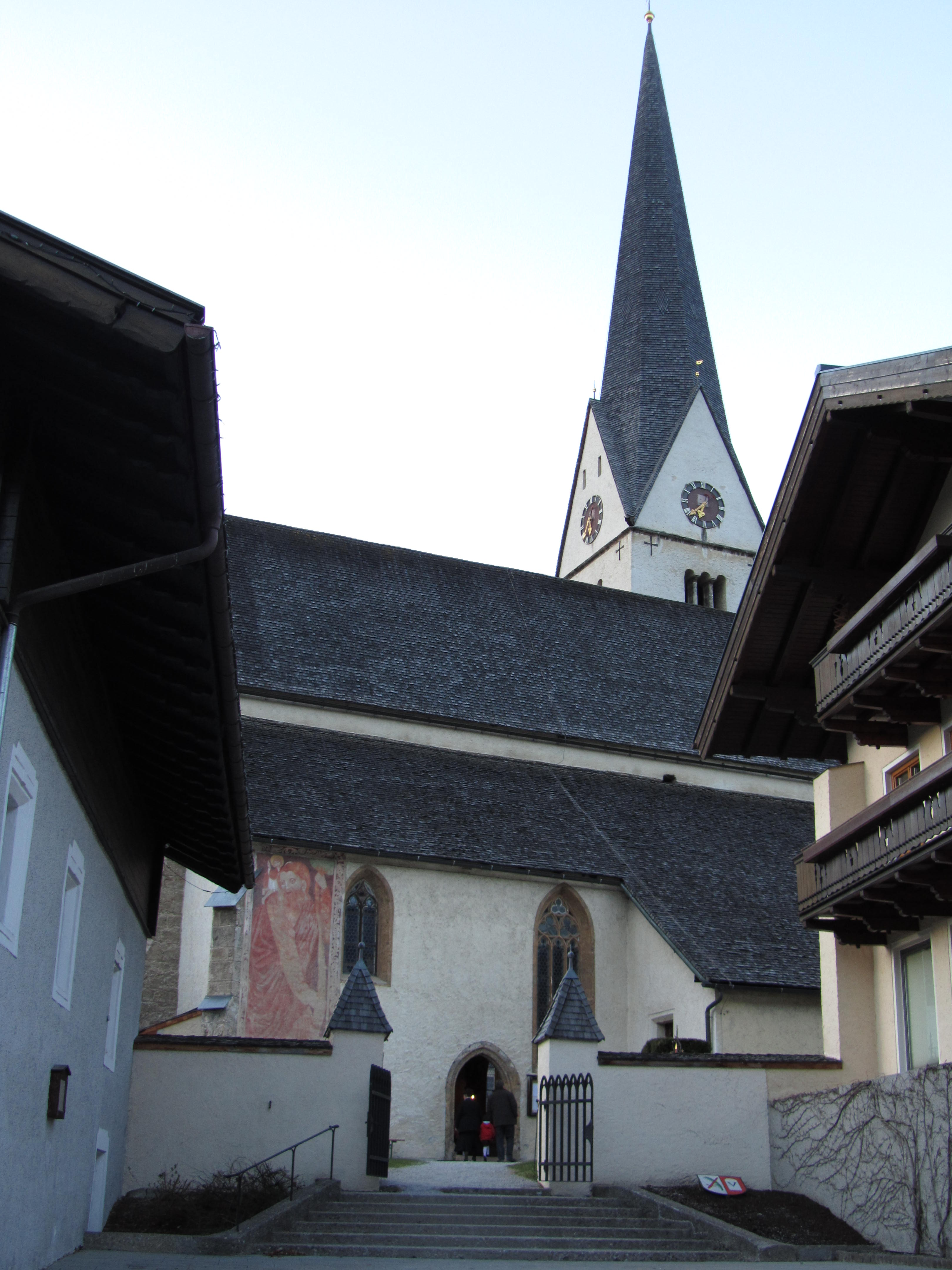 Kath. Pfarrkirche hl. Cyriak